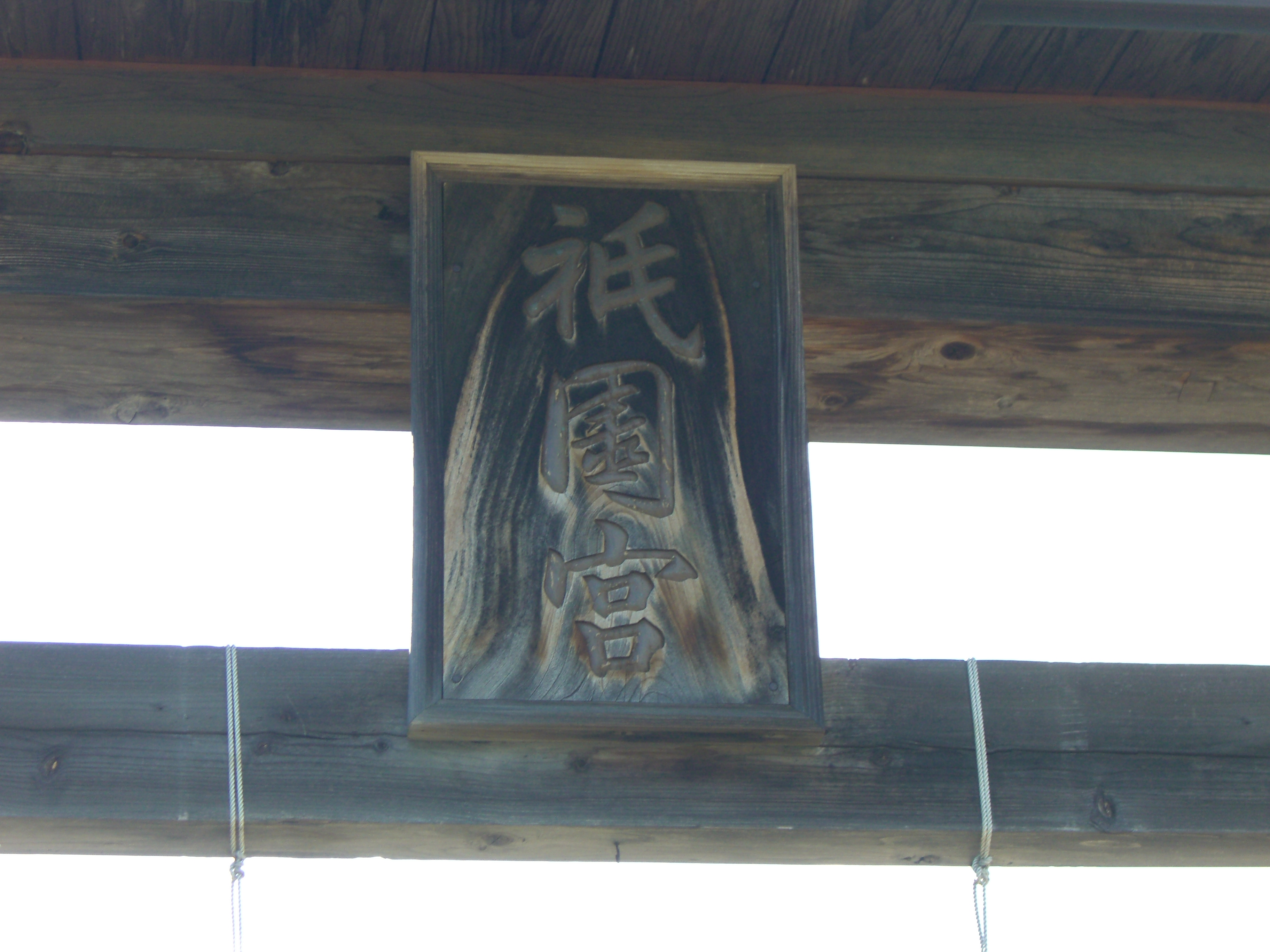 津嶋神社大鳥居